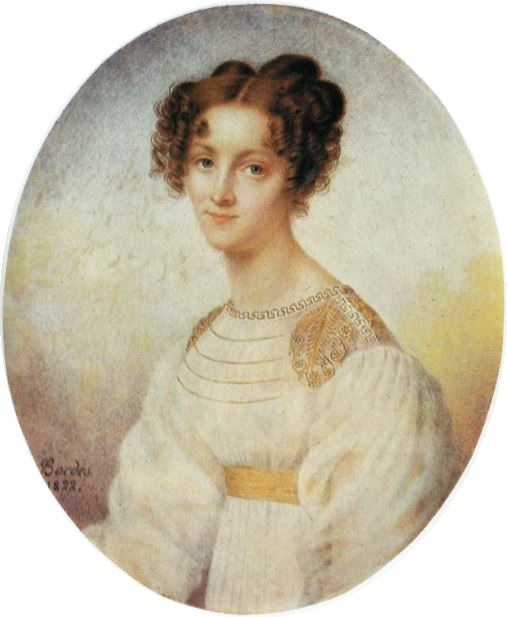 Klaudyna z Działyńskich Potocka (1801-1836)